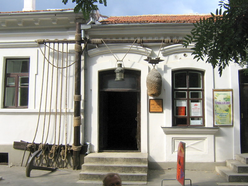 Вхід до музею Гріна у Феодосії